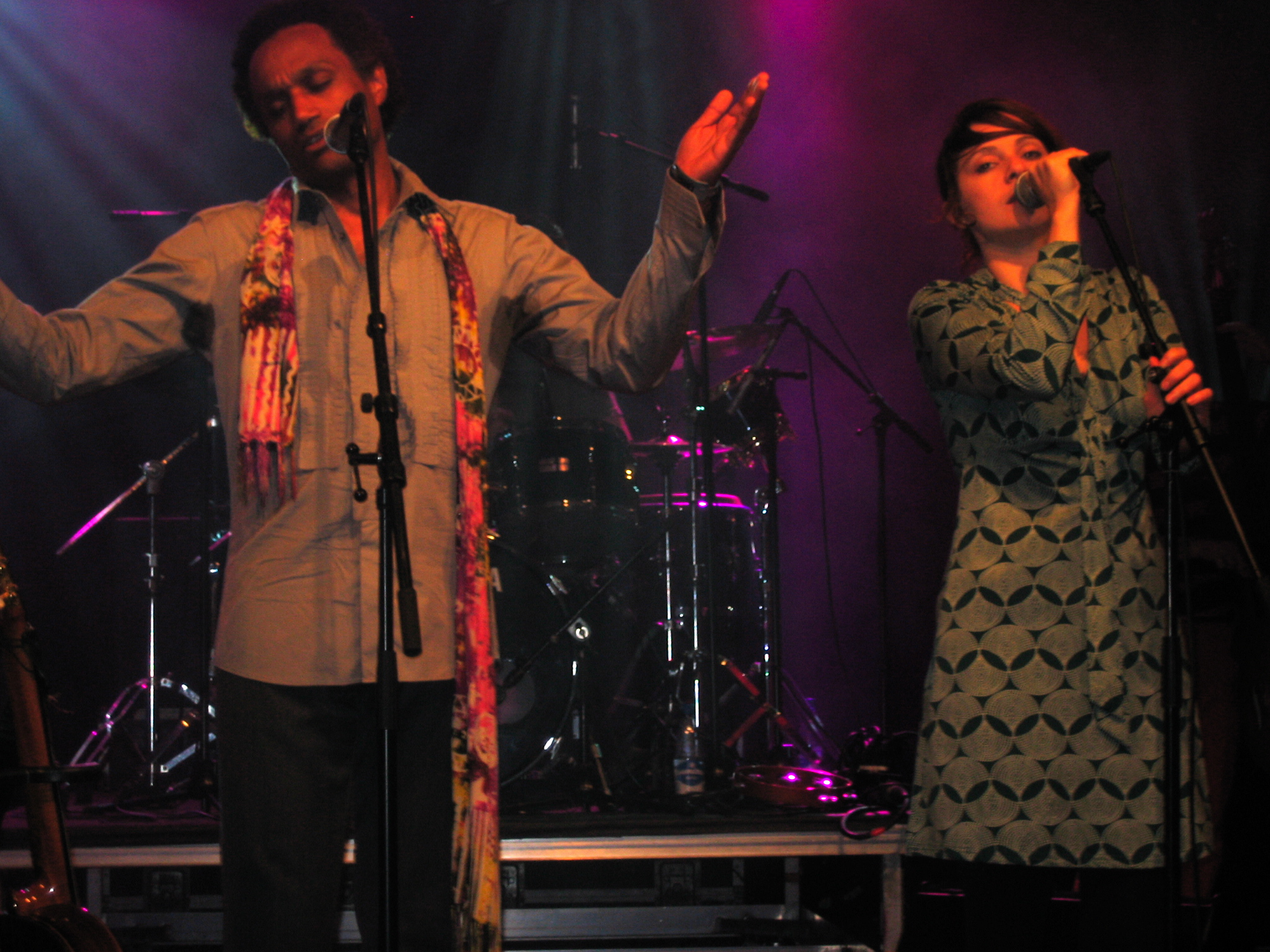 Nouvelle Vague live at Arvikafestivalen 2007 (Gerald Toto and Melanie Pain)